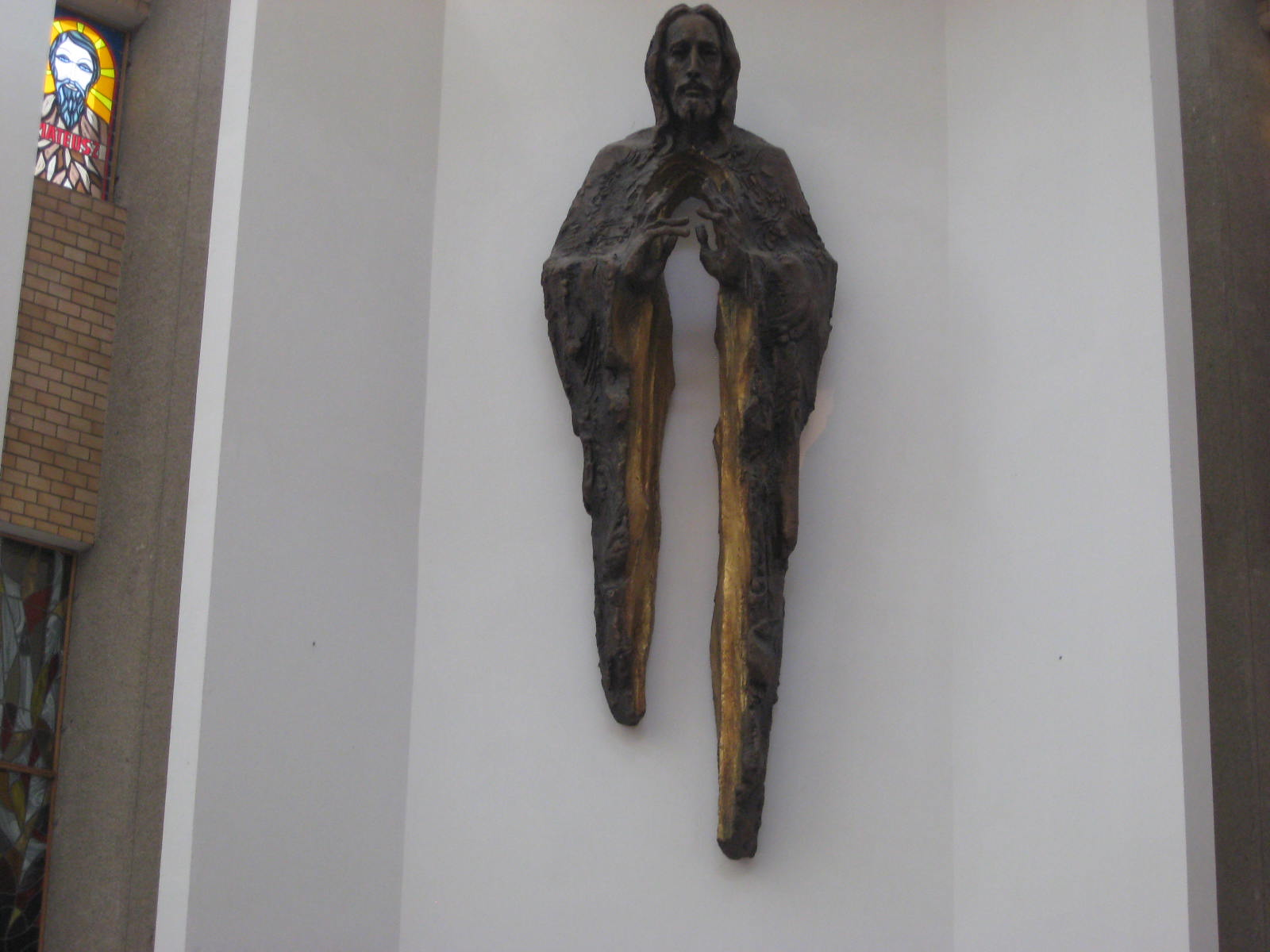 Rzeźba Jezusa Chrystusa w prezbiterium